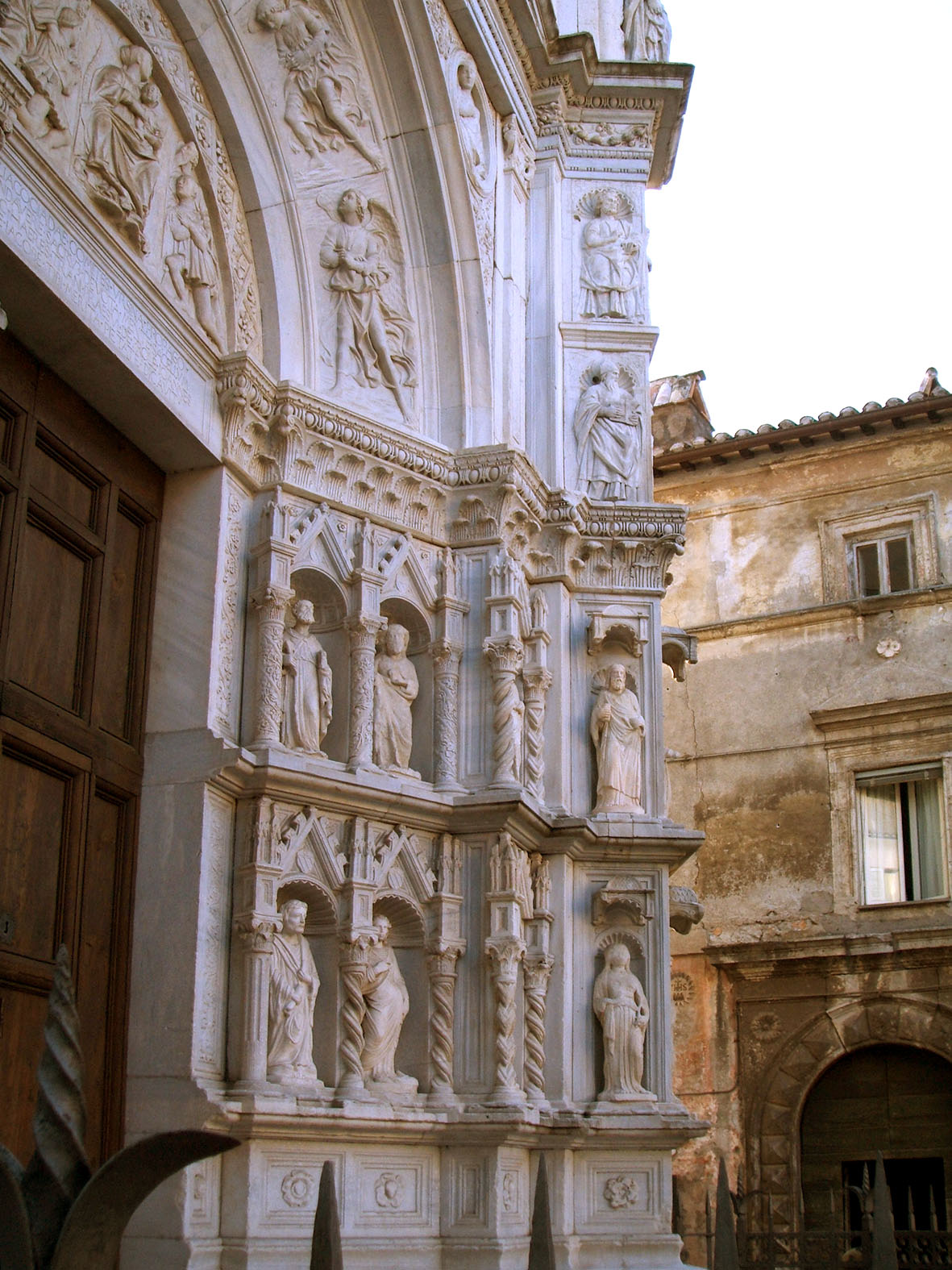 Vicovaro RM, Chiesa San Giacomo, dettaglio